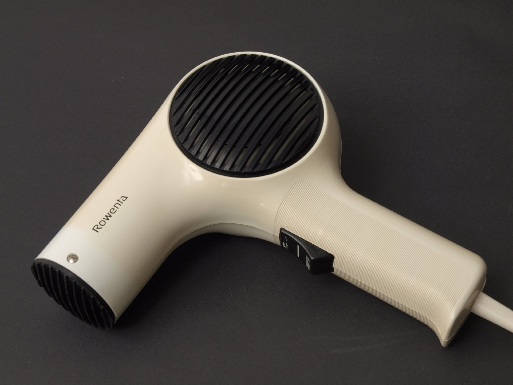 Haatrockner von Rowenta Typ EK-661/67, 450 W/ 250W